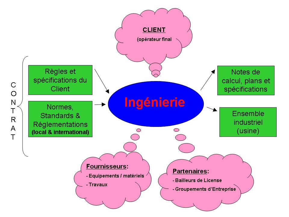 Schéma système de l'ingénierie